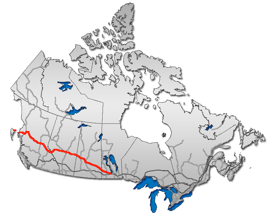 Trans Canada Highway on Canada map